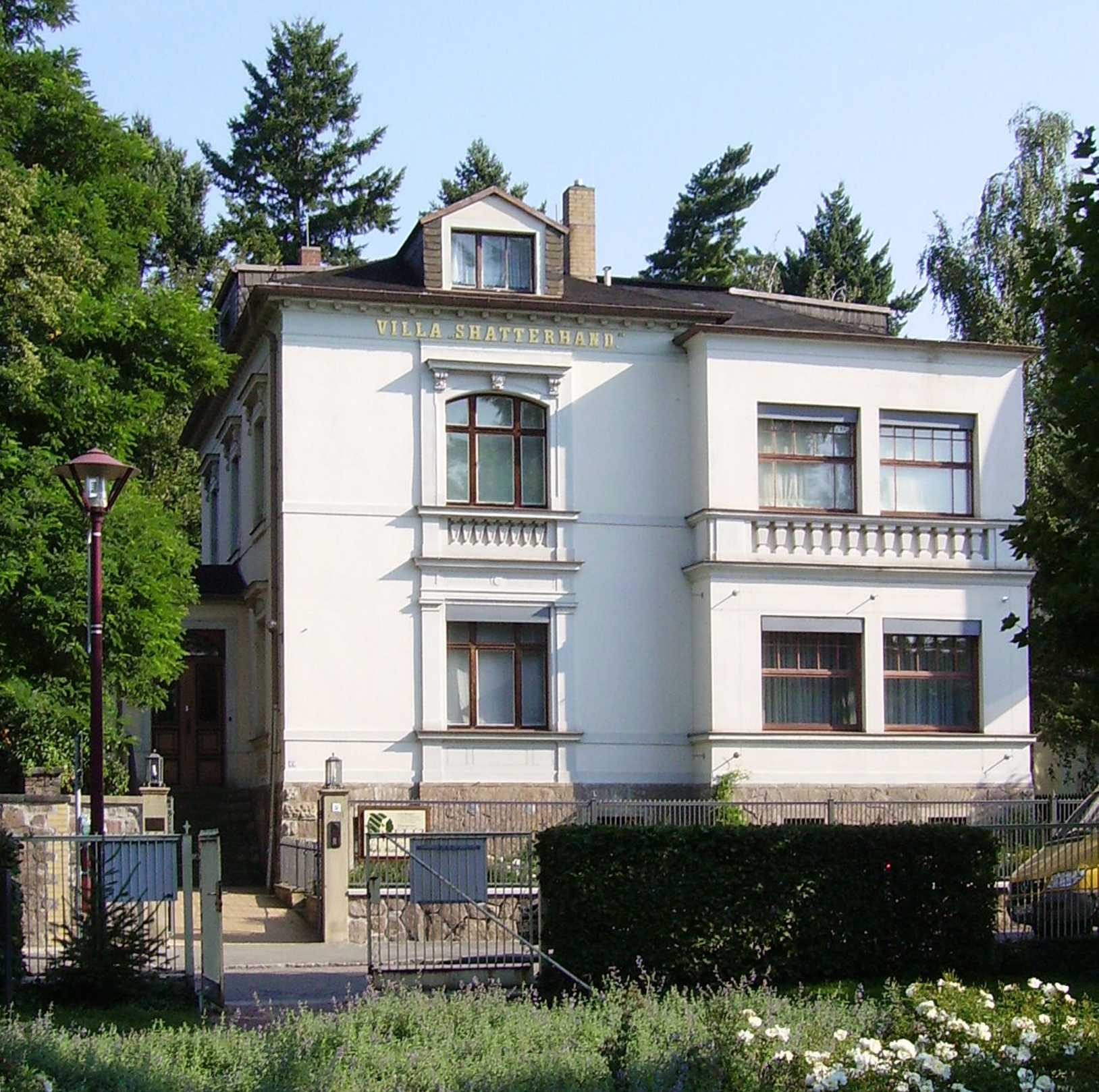 Karl-May-Museum in Radebeul (Germany)